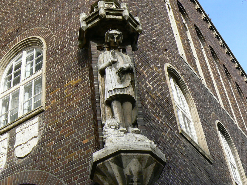 Ohmann Béla: Szent Imre herceg szobra; felállították: 1930